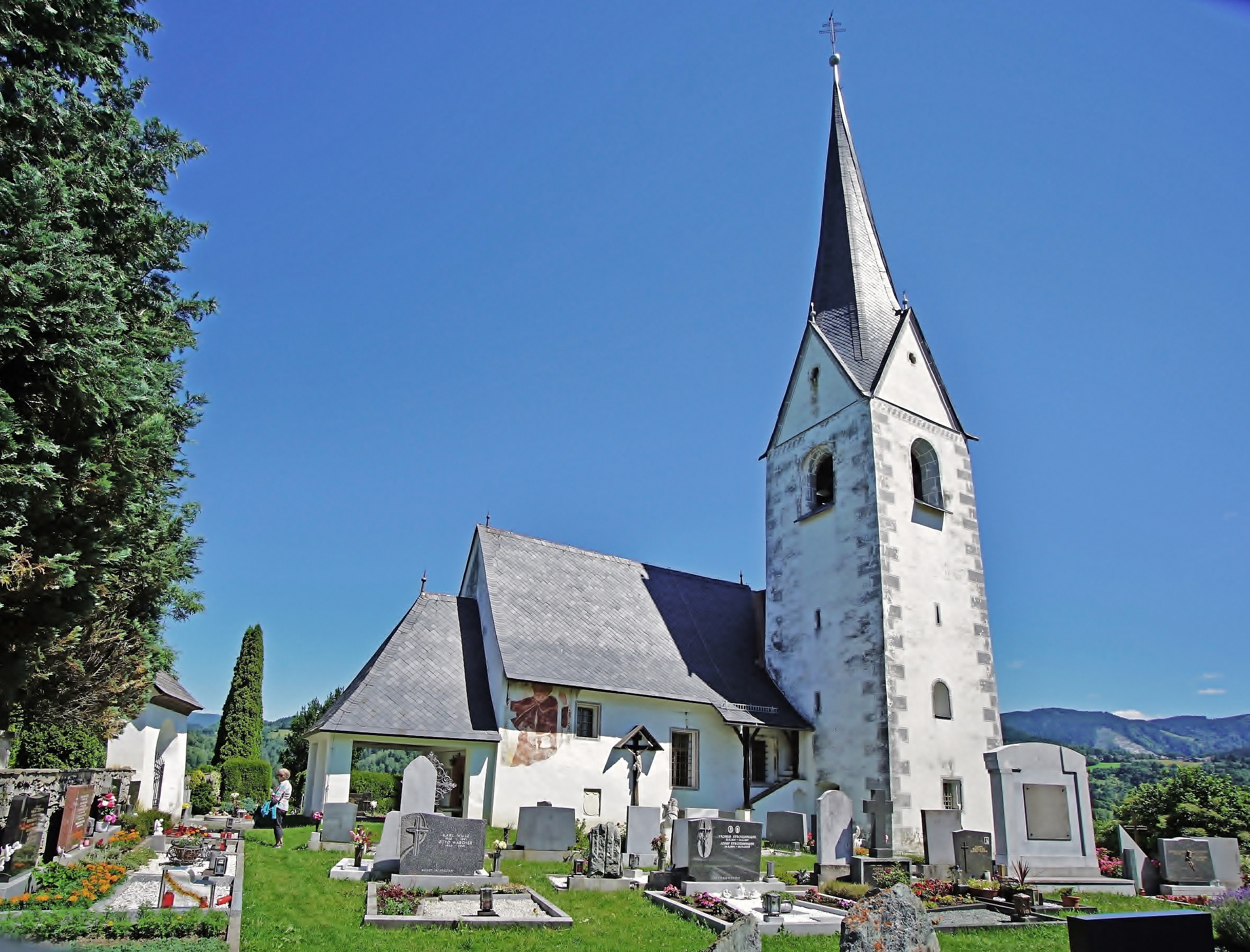 Kath. Filialkirche St. Martin und Friedhof (Feldkirchen in Kärnten)